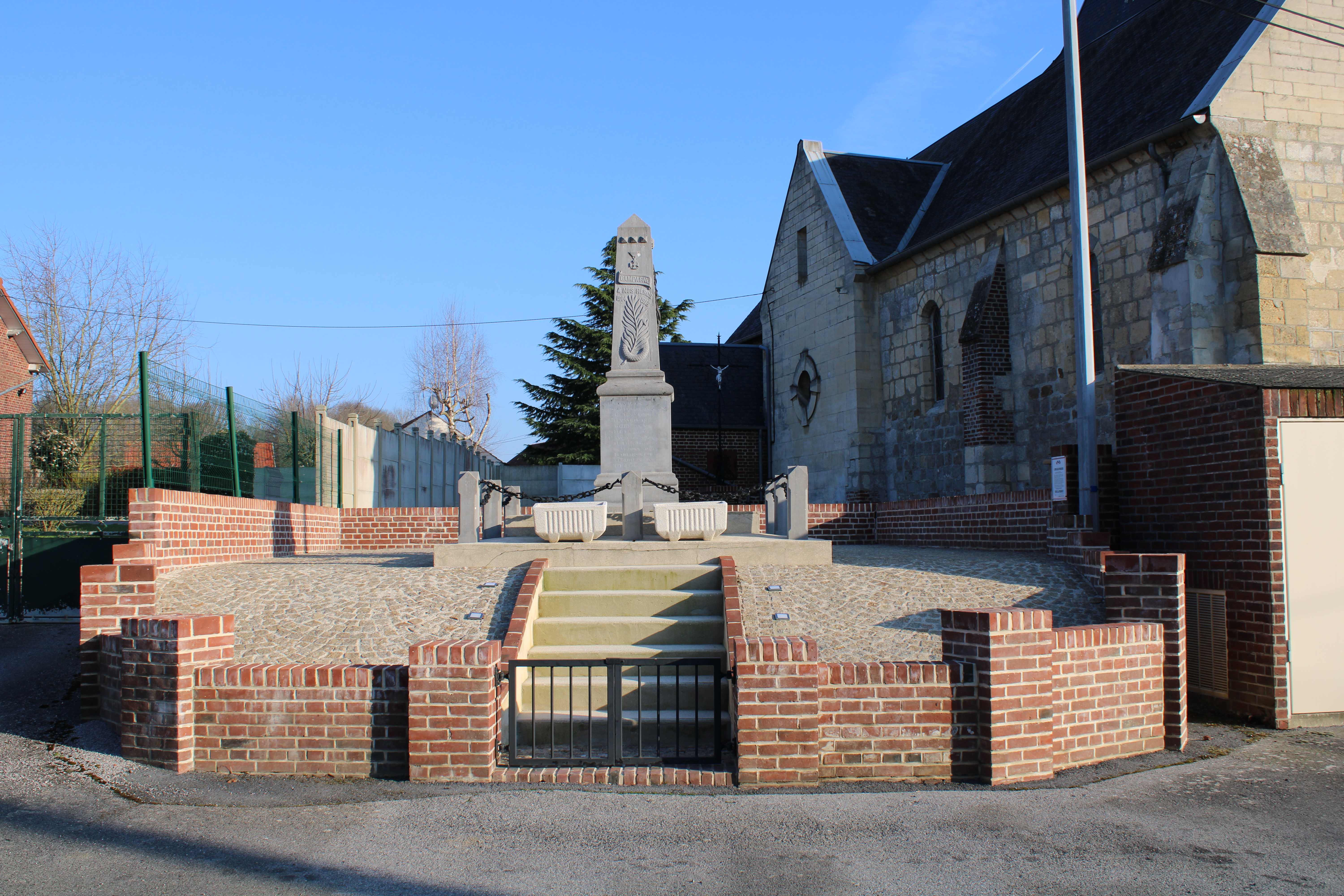 Le monument aux morts.